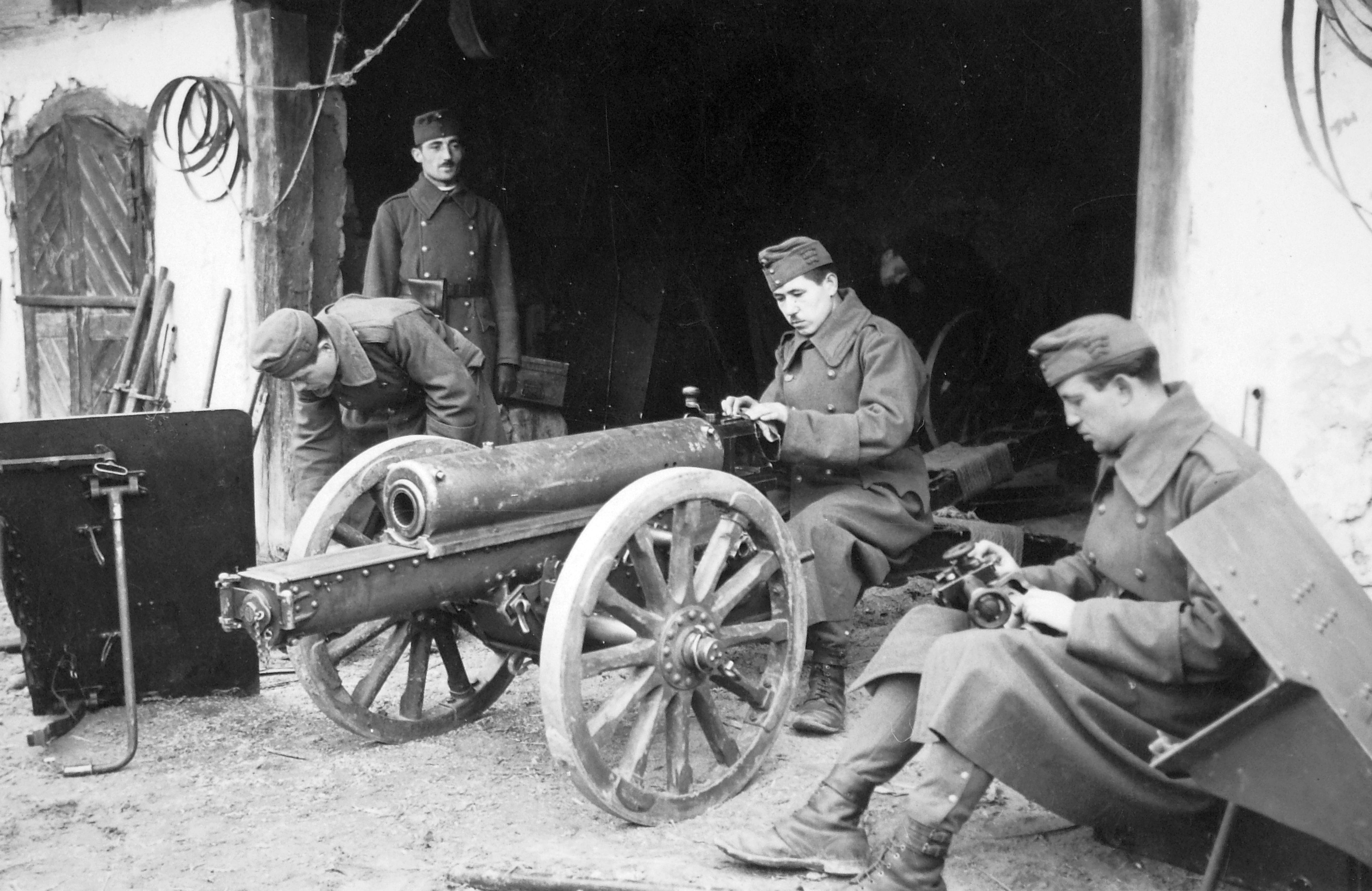 15/31M 75 mm-es Skoda hegyiágyú kezelőivel összeszereléskor. Tags: second World War, Skoda-brand, cannon, weapon, soldiers of Hungary Title: 15/31M 75 mm-es Skoda hegyiágyú kezelőivel összeszereléskor.